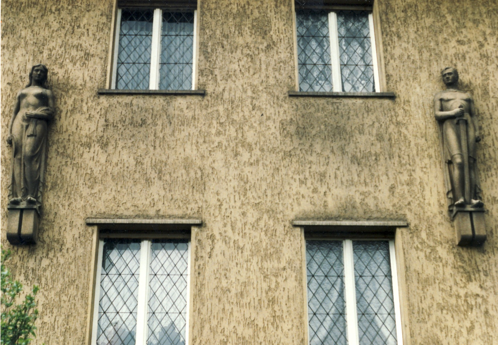 F.-v.-Stein-Straße: Diese Relikte der NS-Architektur symbolisieren "Reichsnährstand" und "Reichswehrstand"